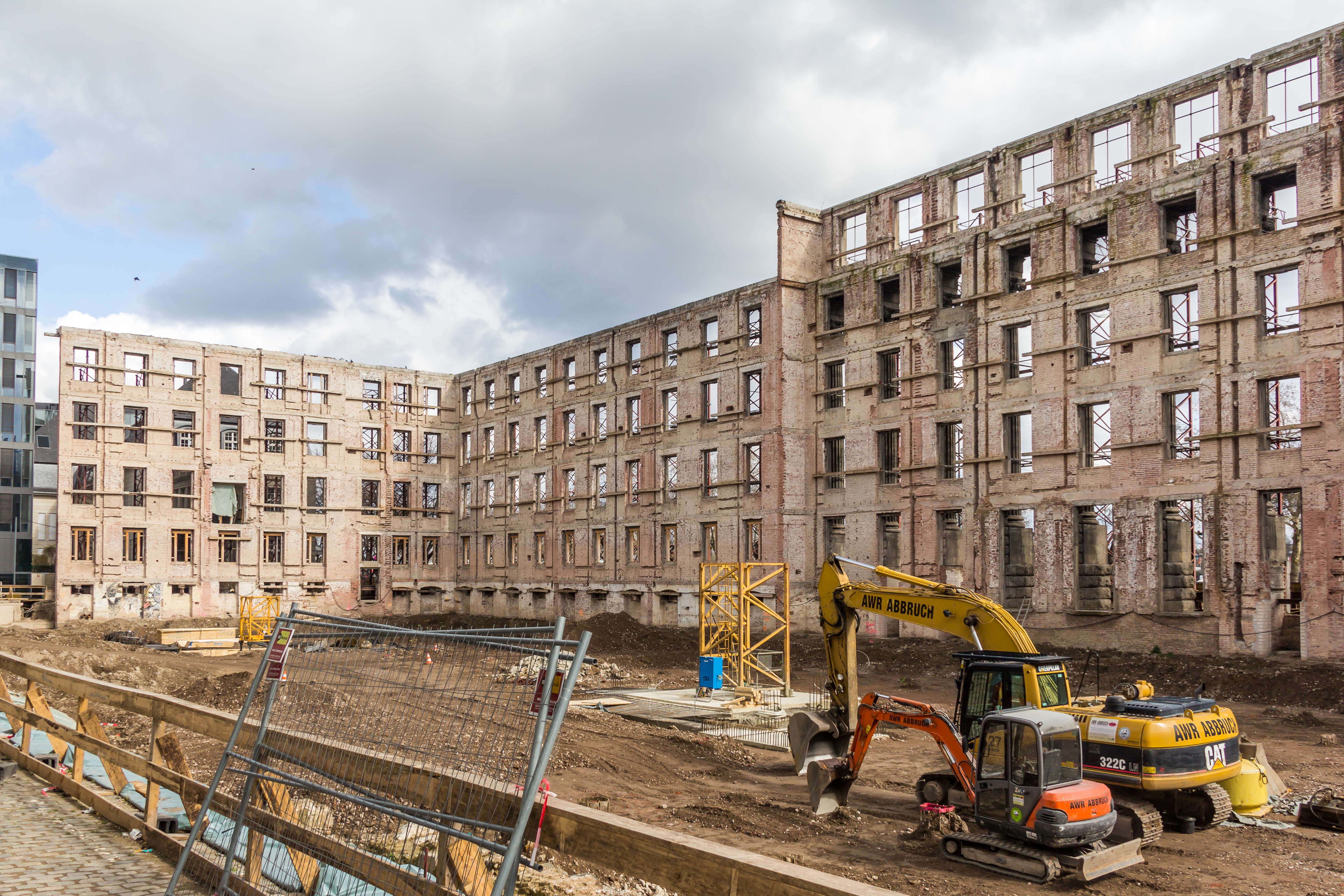 Neue Direktion Köln - ehemalige Reichsbahndirektion - Fassade von hinten. Das Gebäude wurde im Rahmen des Umbaus zur „Neue Direktion Köln“ entkernt. Hauptmieter soll ab 2016 die Europäische Agentur für Flugsicherheit EASA werden.